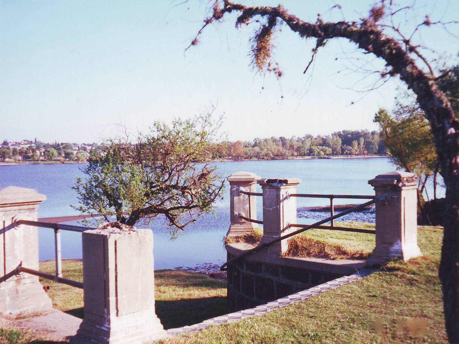 Muelle Miranda, (margen derecha del Río Negro, en el Dpto. del mismo nombre).Antiguo atracadero de las balsas. Fotografía tomada por Chrysthel Schwegler Cabuto el 07/05/2000.